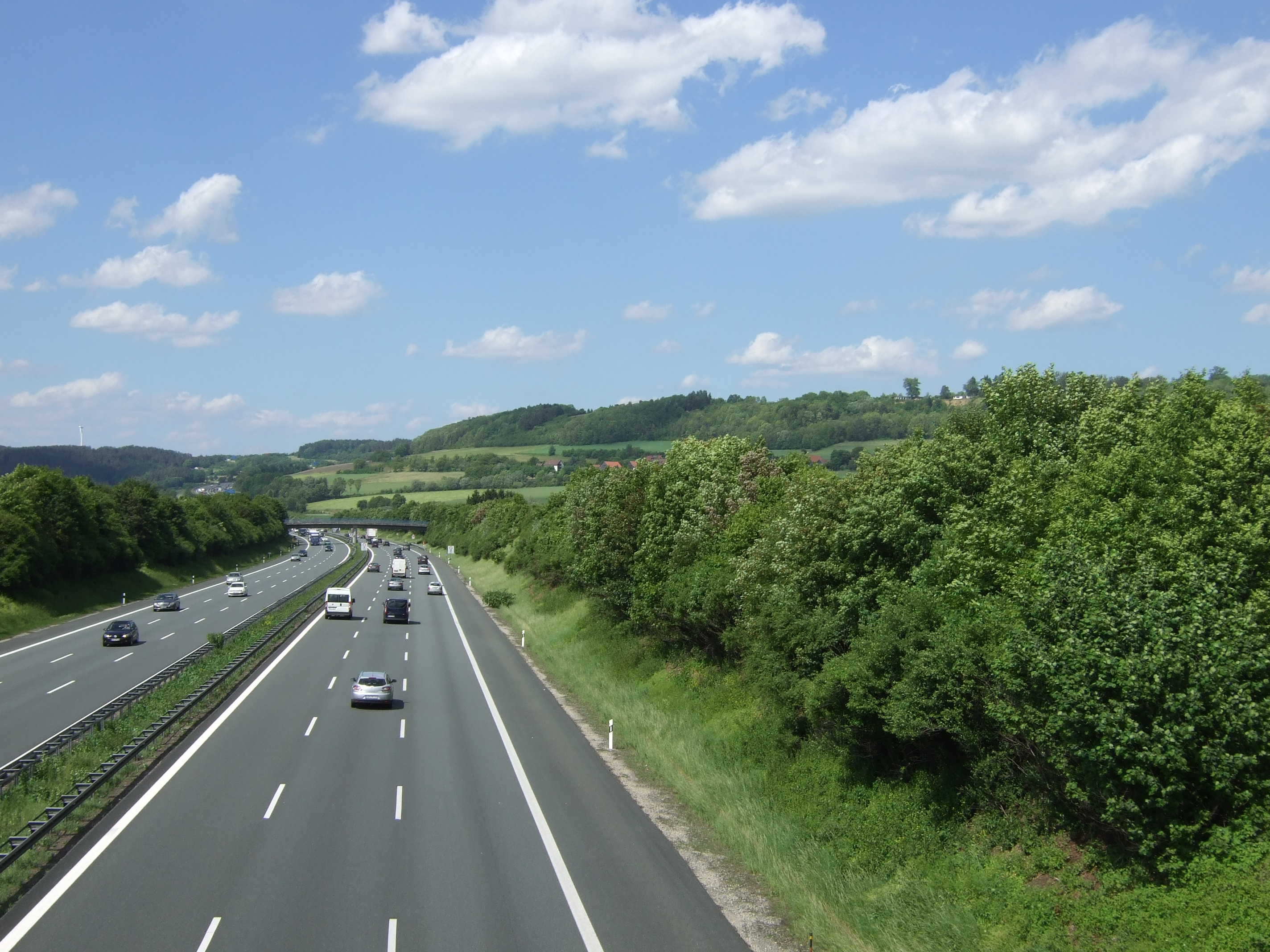 A 9 bei Bindlach